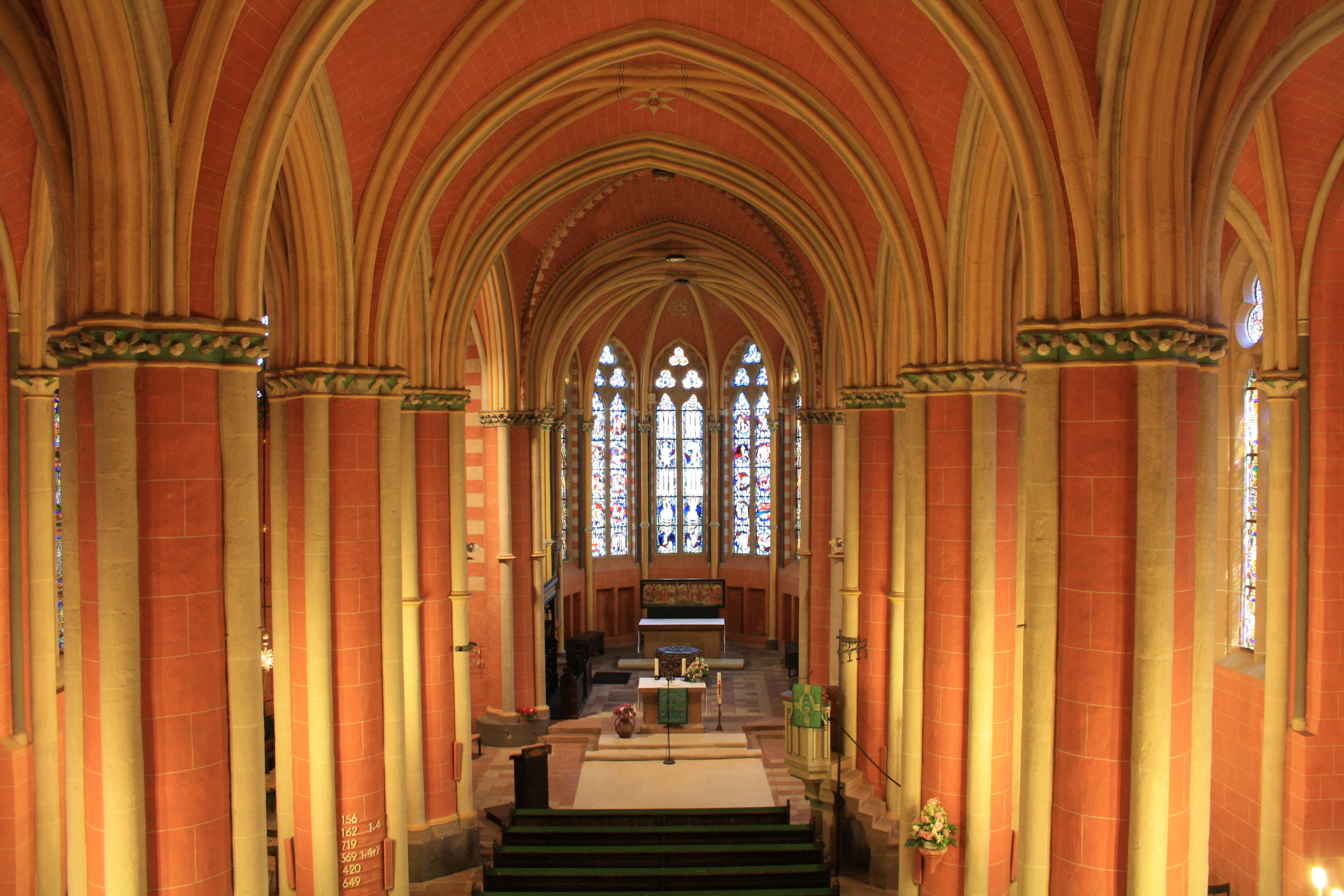 Die Stiftskirche in Wetter, innen. Blick von der Orgel-Empore im Westen aufs Mittelschiff in Richtung Osten. Querformat